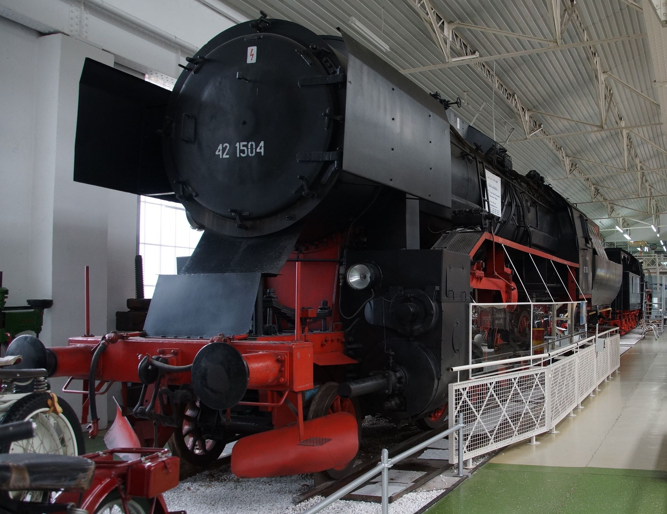 Dampflokomotive der Baureihe 42 in Technik Museum Speyer.